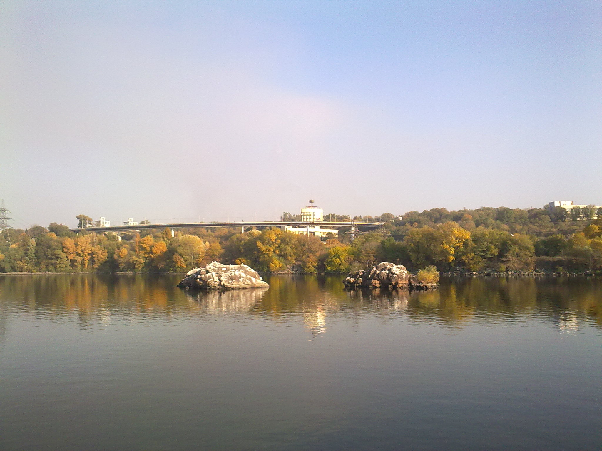 Sotsgorod, Zaporozhye, Zaporozhskaya oblast', Ukraine